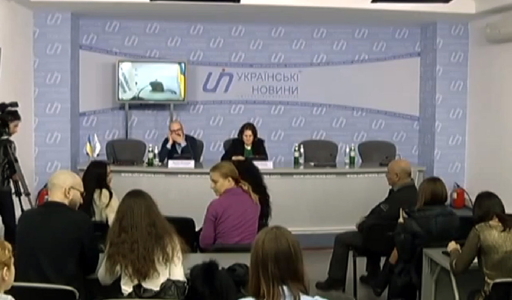 Прес-конференція Тетяни Монтян і Дмитра Філімонова у прес-центрі «Українських новин», 10 грудня 2014.